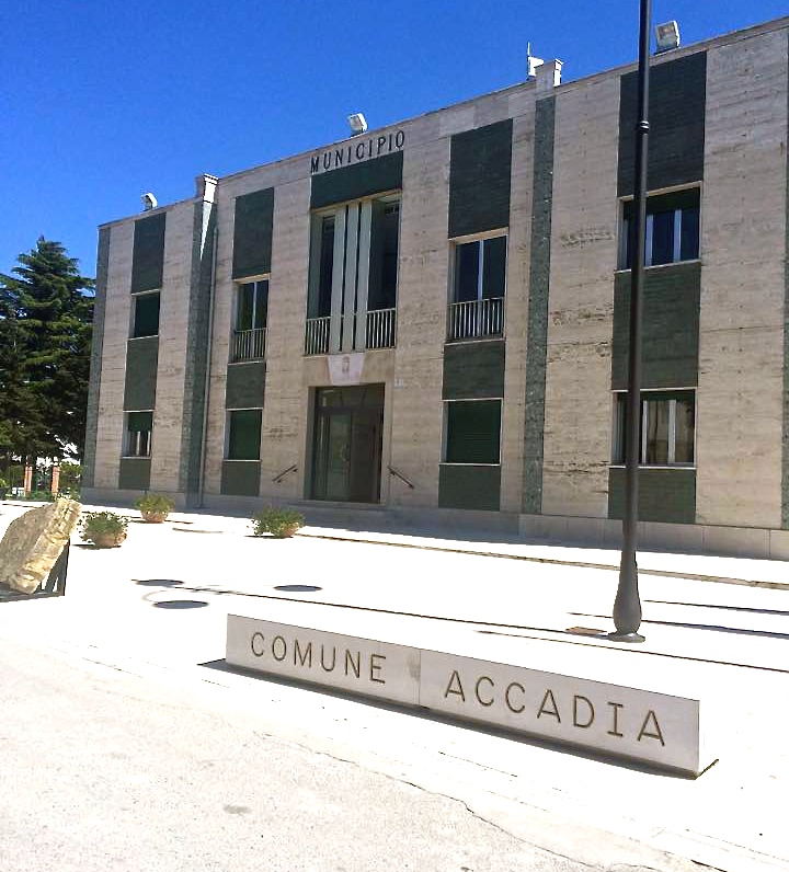 Vista della facciata del Municipio di Accadia, provincia di Foggia. 2015